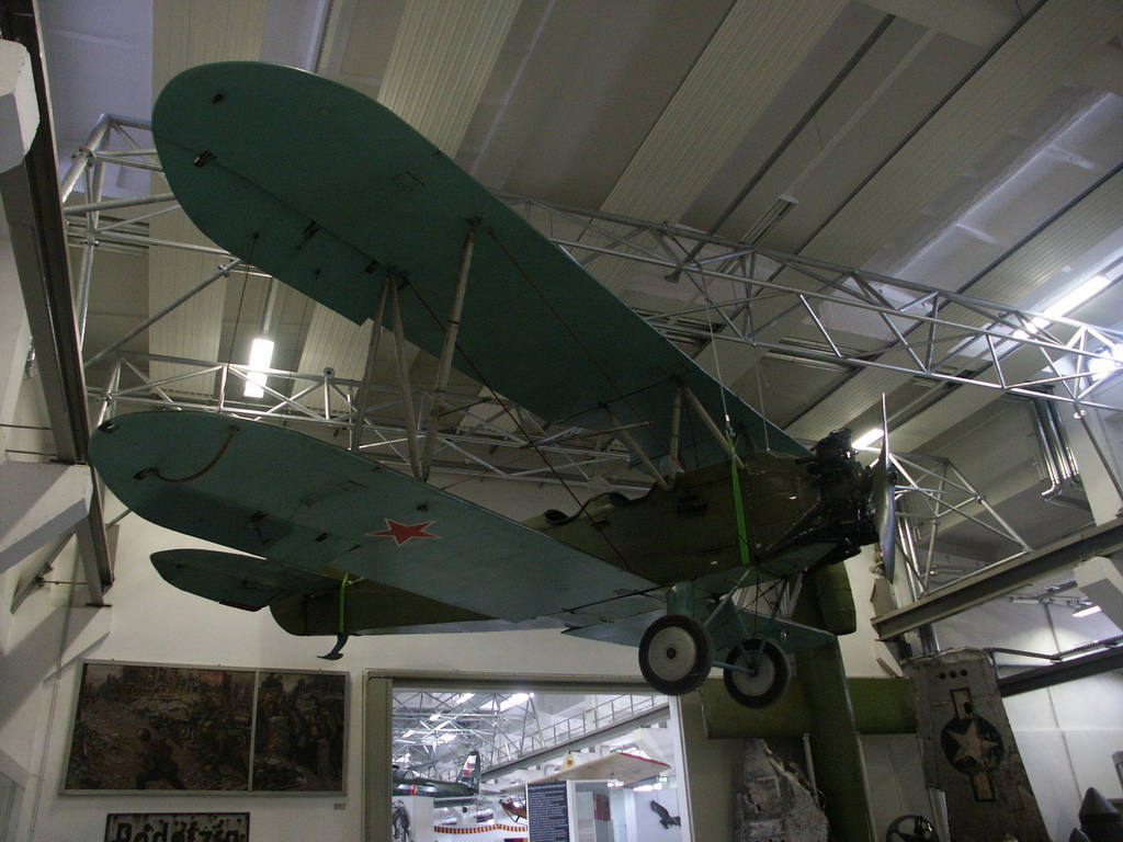 Bundeswehrmuseum Dresden mit Teilen von der NVA Remark: Polikarpov Po-2